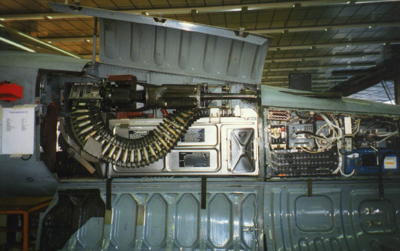 Bordkanone einer F-5E